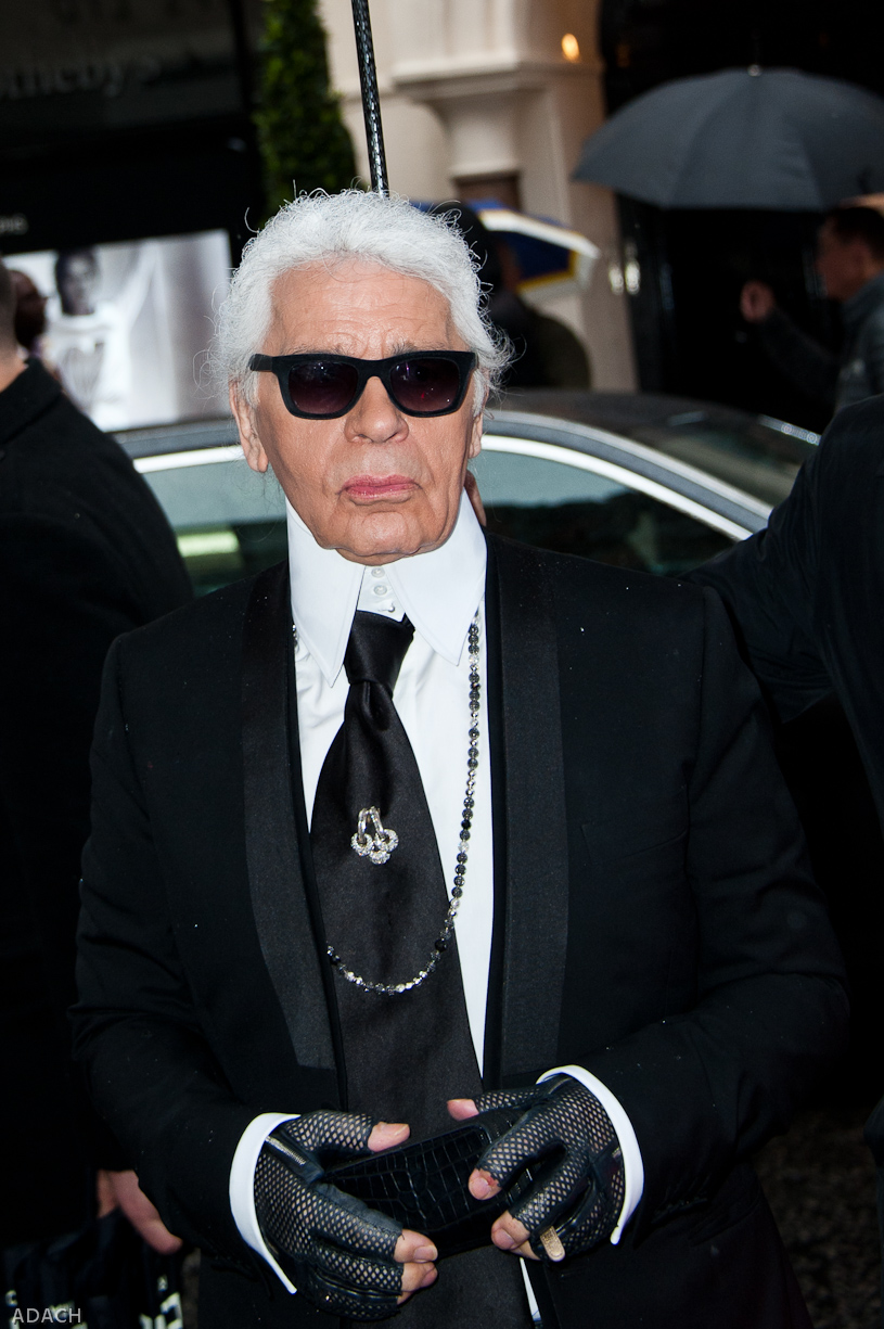 Fendi store opening - Karl Lagerfeld